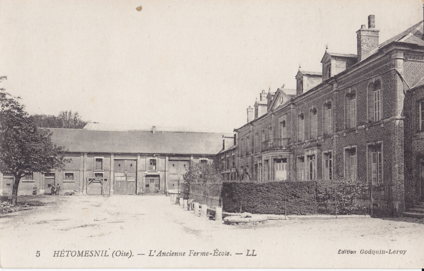 Carte postale ancienne éditée par Godquin-Leroy LL n°5 : HETOMENIL - L'Ancienne Ferme-Ecole